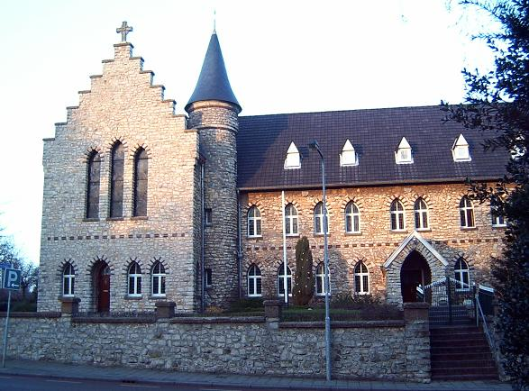 Limburgs: Kloaster in kundersjtein in Hölsberg